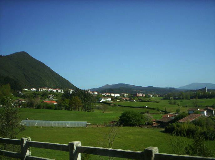 El pueblo de Arteaga, con la torre a la derecha en: A photo of the town of Arteaga, with its tower on the right-hand side. es: Una foto del pueblo de Arteaga, con su torre a la derecha